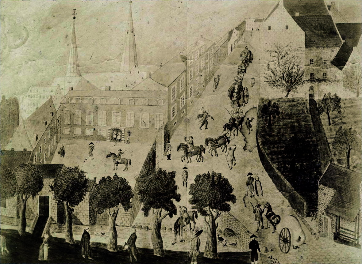 Abdij van Thorn: Foto van aquarel (opmerking: Bijschrift: naar aquarel in het Rijksarchief te Maastricht)